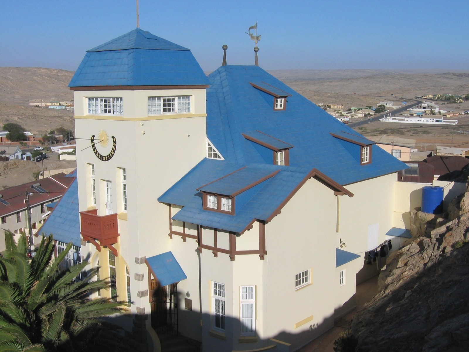 Görke Haus, Lüderitz, Namibia